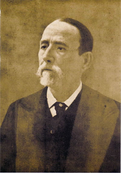 Giustino Fortunato junior. Giustino Fortunato.